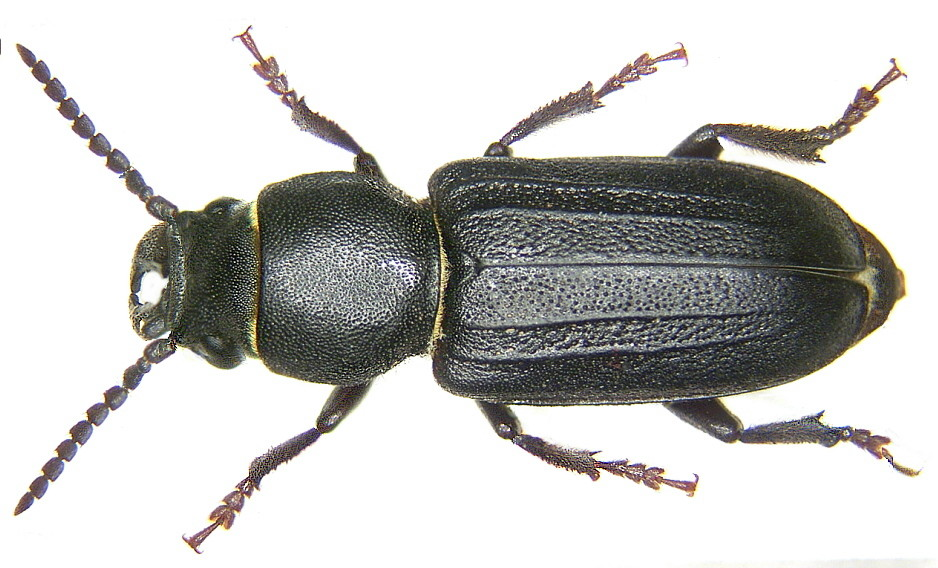 Familie: Cerambycidae Grösse: 10-20 mm Verbreitung: Europa Ökologie: Entwicklung in Kiefernstümpfen Fundort: Germania, Oberfranken, Kulmbach leg.det. U.Schmidt, 1995 Foto: U.Schmidt, 2006